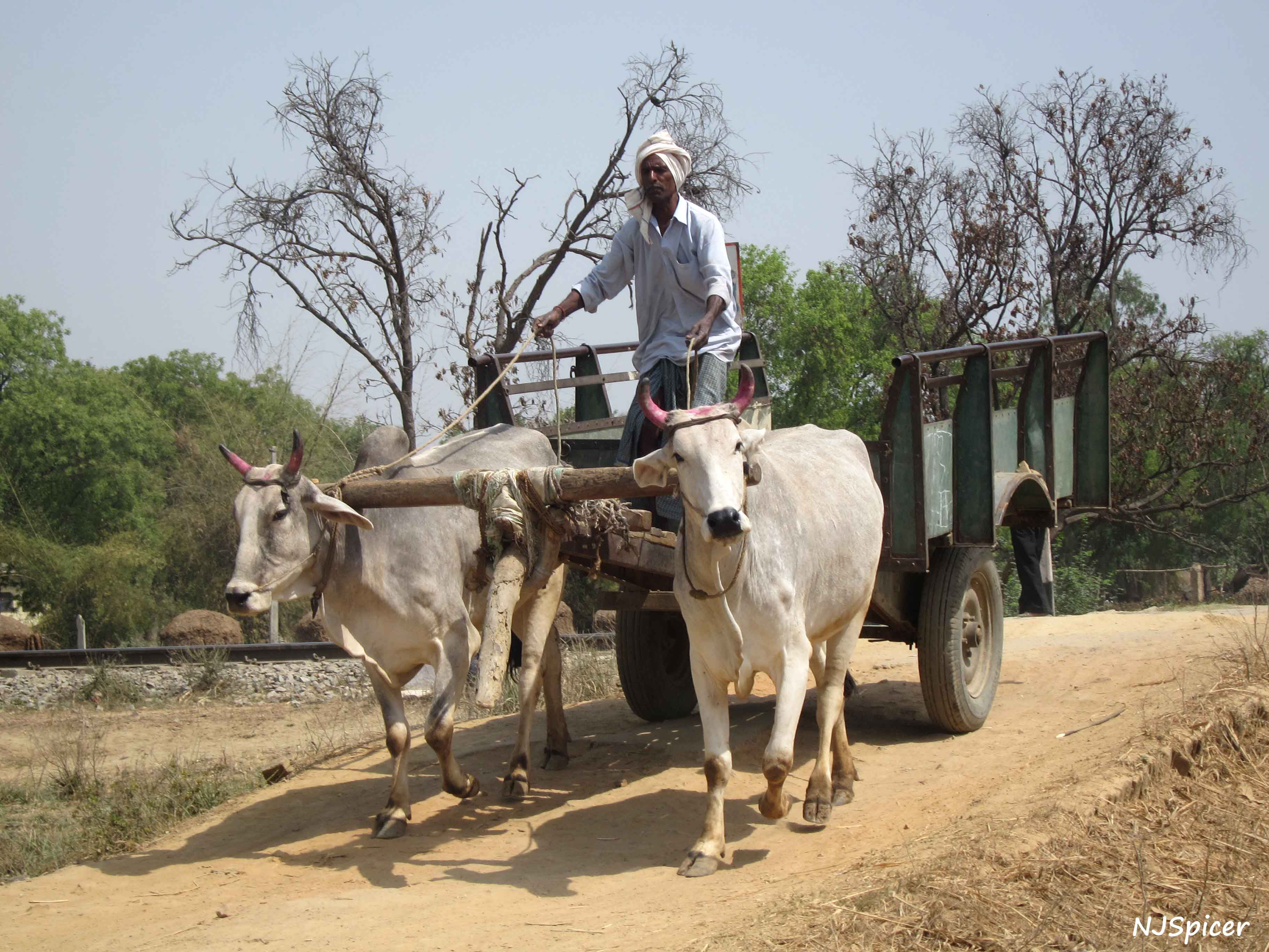 Bara Banki district, Uttar Pradesh, India